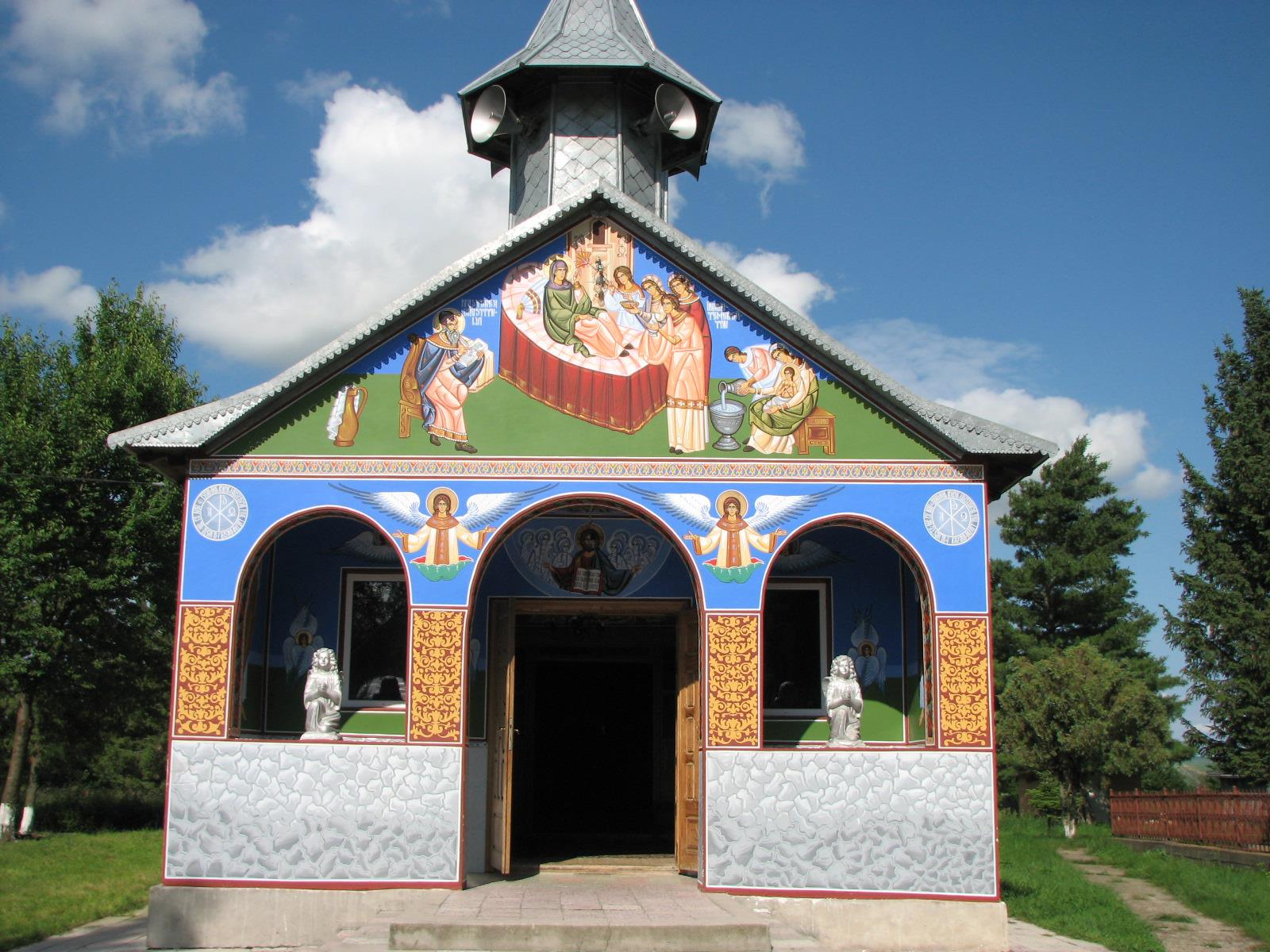 Biserica din Stamate - Intrare